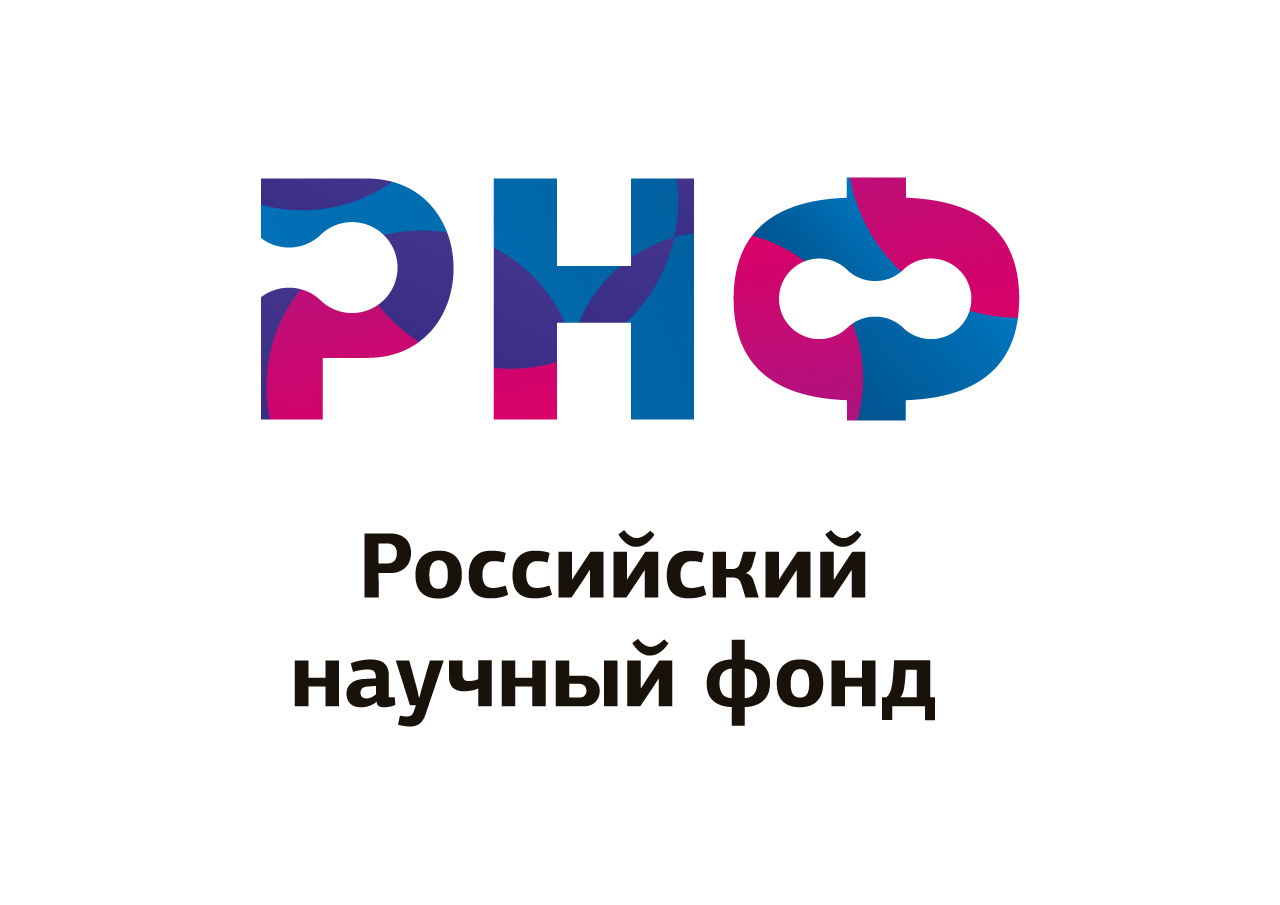 Эмблема Российского научного фонда